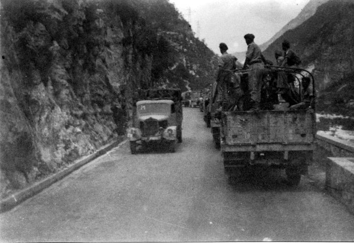 פניתי אל ארכיון בית הפלמ"ח בזו הלשון: שלום רב, ...הריני מבקש לעשות שימוש [בוויקיפדיה] בתמונות המוצגות באתר שלכם. ... משמעות האישור היא מתן היתר לכל מאן דבעי לשכפל את התמונה, *תוך ציון מקורה*. במקרה כזה, ייתכן שתרצו לאשר שימוש בתמונה מוקטנת, שאינה מתאימה להדפסה בספר. תודה, ד"ר עוזי וישנה ותשובתם: ... כל התמונות הנמצאות באתר הפלמ"ח ניתנות להורדה. הן מראש אינן באיכות הדפסה לספר ו/או פרסום אחר. ניתן להשתמש בתמונה המבוקשת תוך ציון העובדה שהיא נמסרה באדיבות "אוצר תמונות הפלמ"ח". בברכה, ד"ר אלדד חרובי, מנהל ארכיון הפלמ"ח. (כתובת הארכיון: )